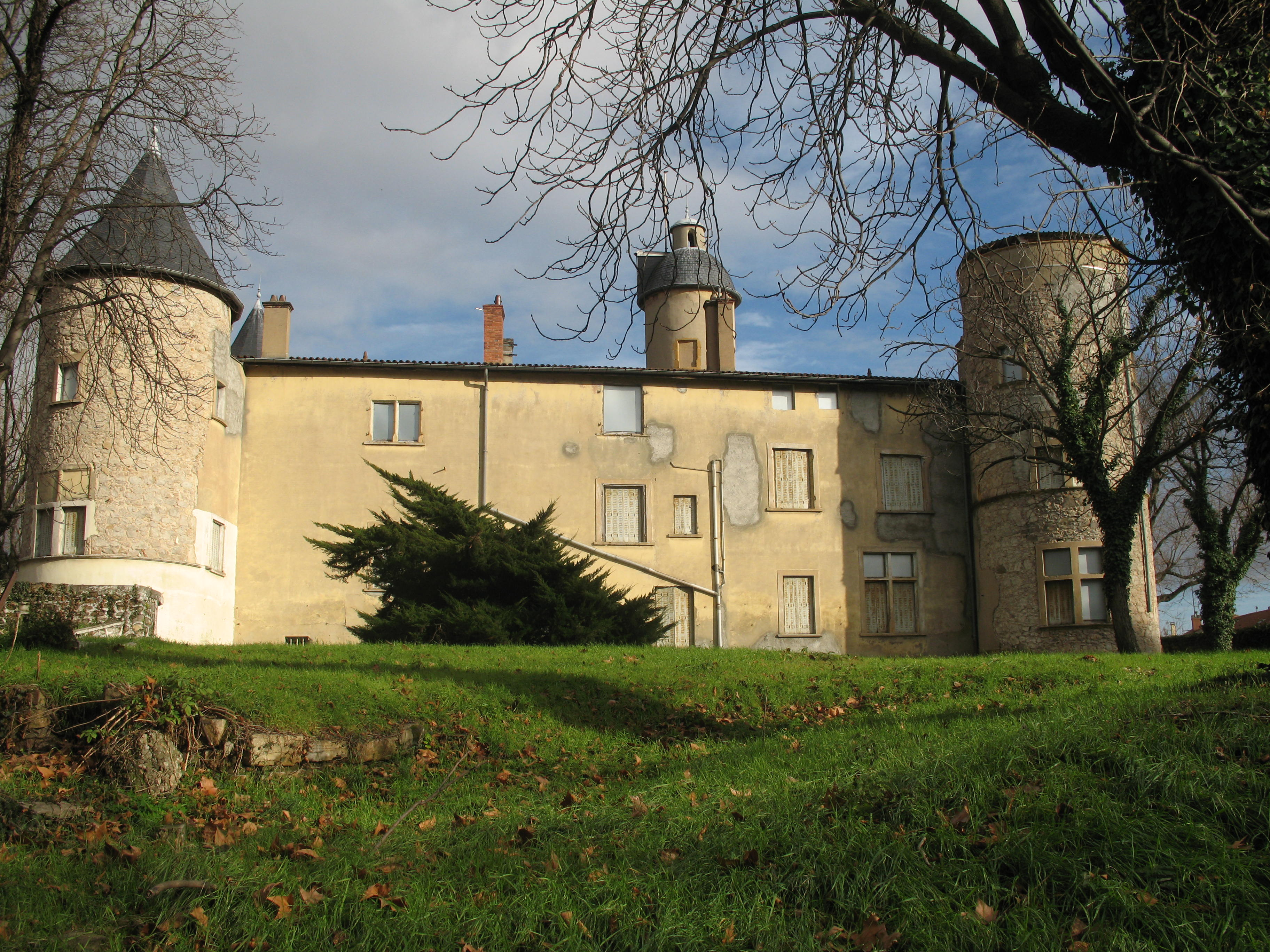 Château de La Motte à Lyon dans le Rhône.